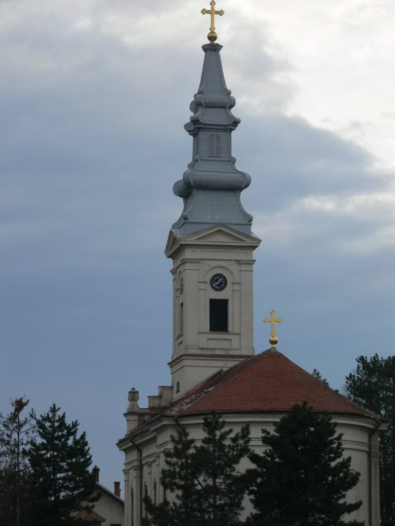 Црква у селу Врело, 19. век